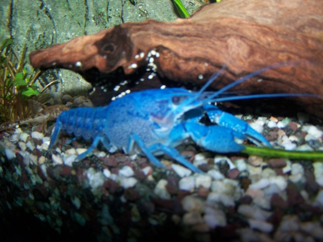 Blauer Floridakrebs